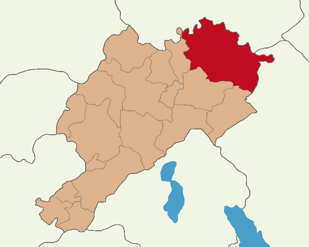 Emirdağ ilçesini konumu